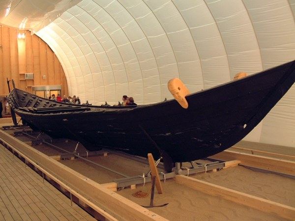 1863 im Nydam-Moor (Südjütland) gefundene Nydam-Schiff von ca. 320 v. Chr.